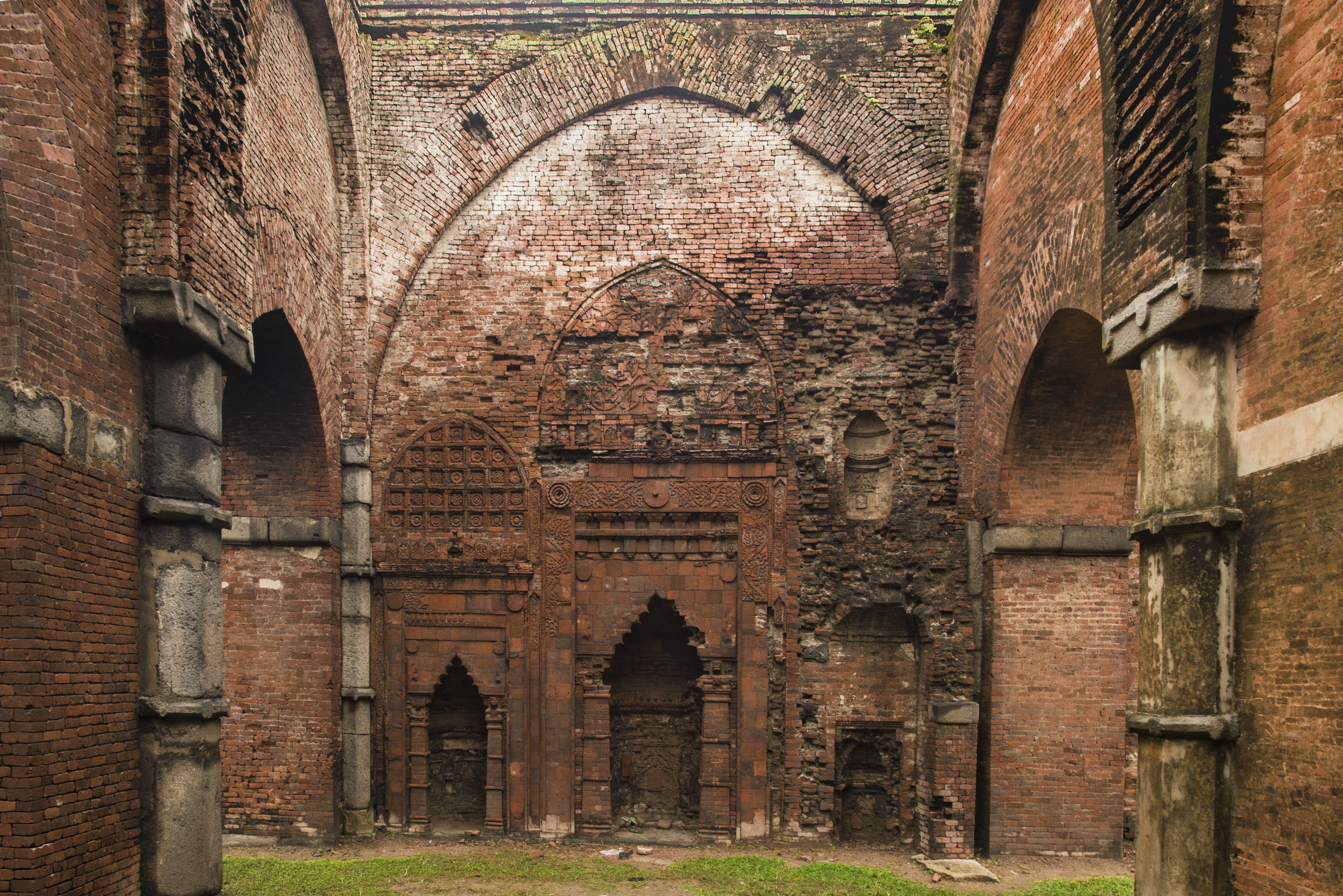 দারাস বাড়ী মসজিদ ও সংলগ্ন মাদ্রাসা ঢিবি